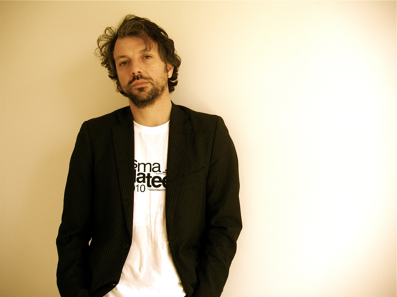 Kirjanik ja ajakirjanik João Lopes Marques.